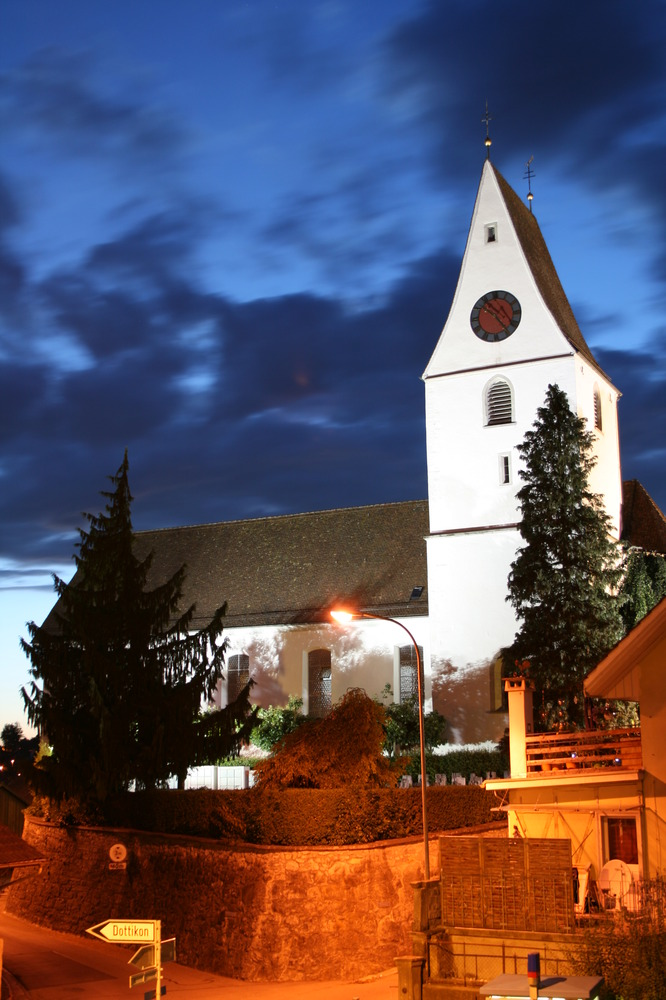 Katholische Kirche St. Michael